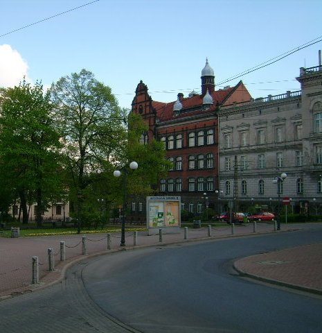 Plac Wolności